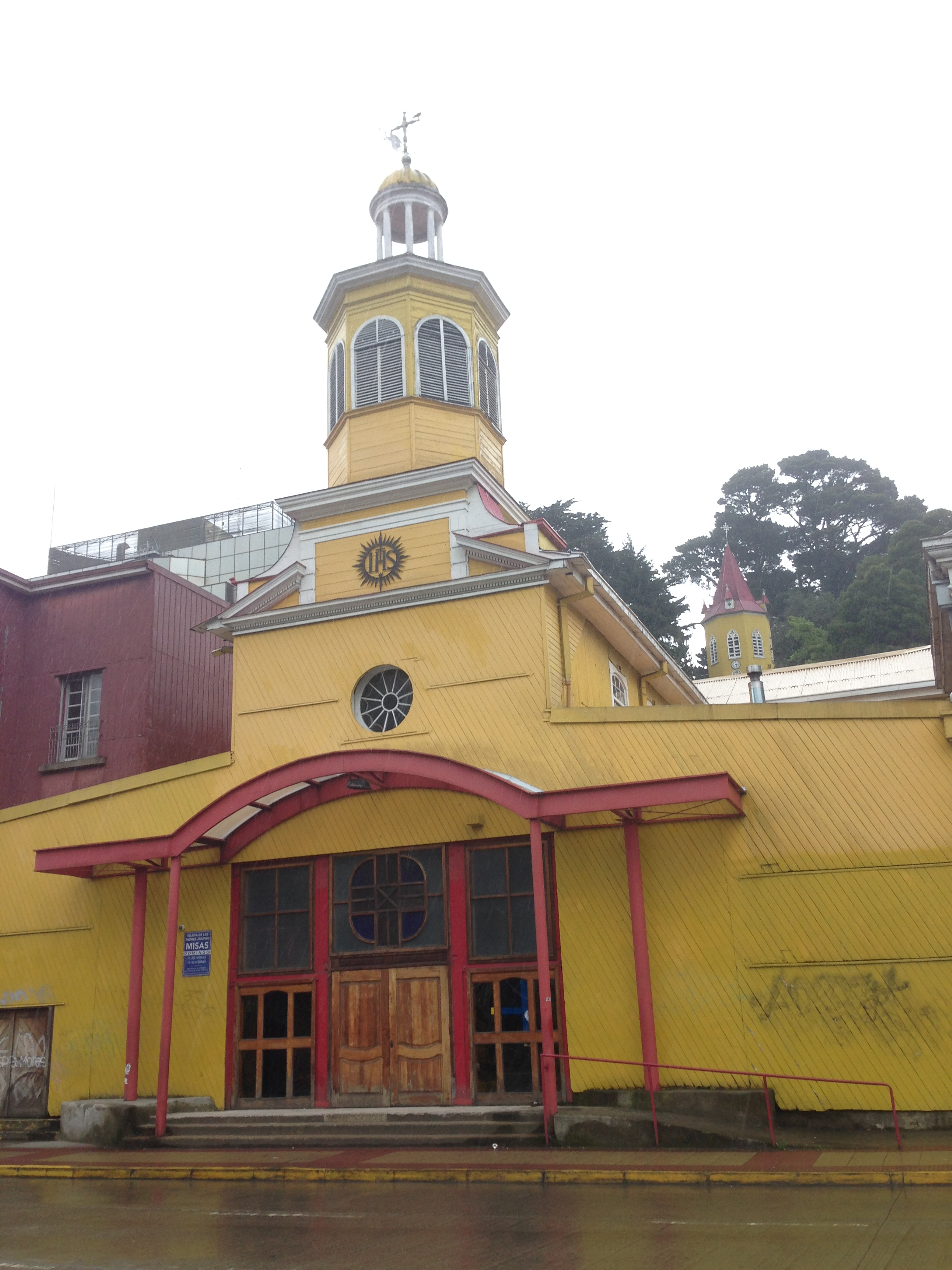 Iglesia de los Padres Jesuitas de Puerto Montt